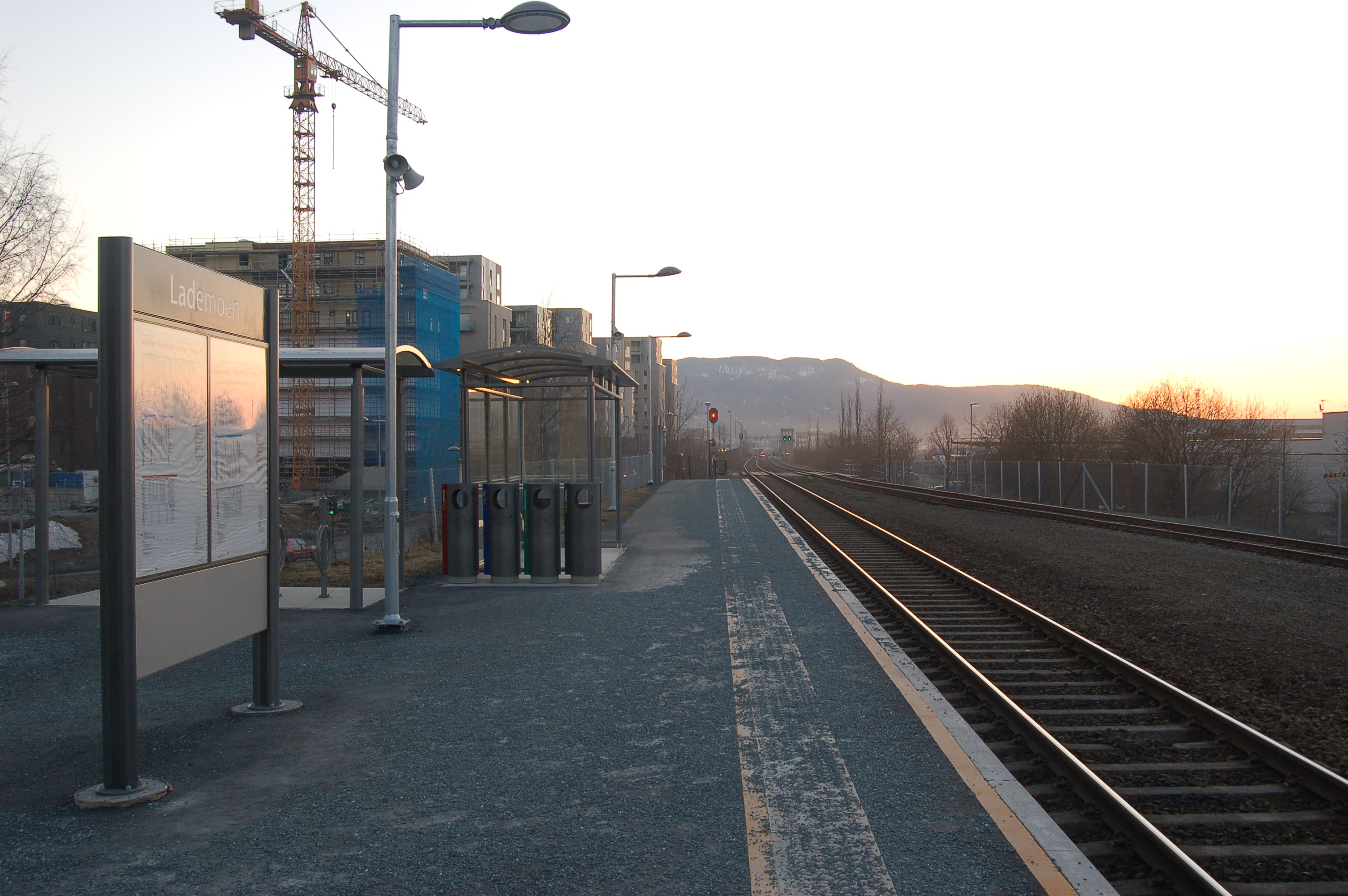 Lademoen/Nedre Elvehavn Station on Nordlandsbanen in Trondheim, Norway